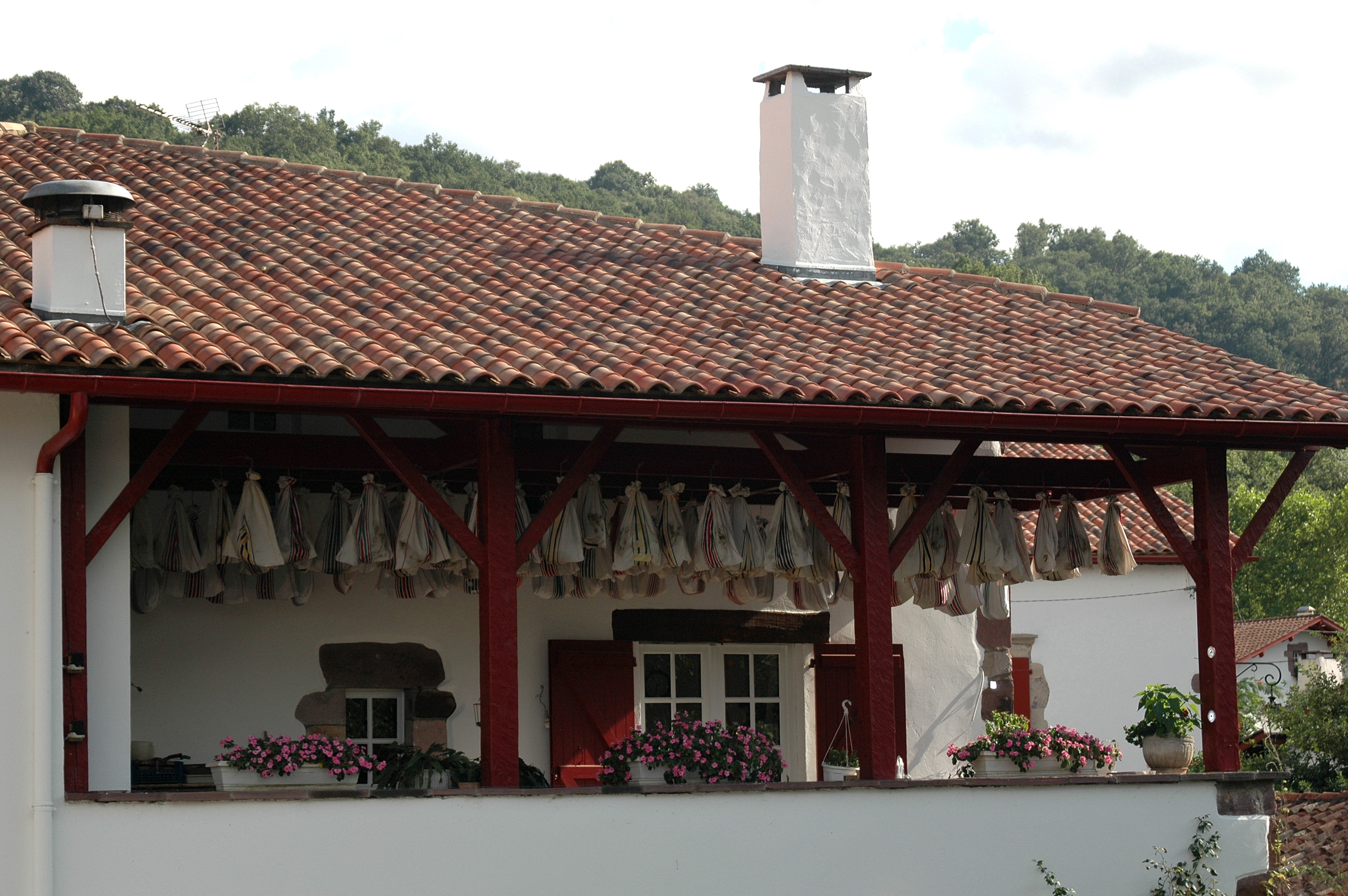 Saint-Étienne-de-Baïgorry, salaisons le long de la Nive des Aldudes. Photo prise le 03/08/06 par Harrieta171